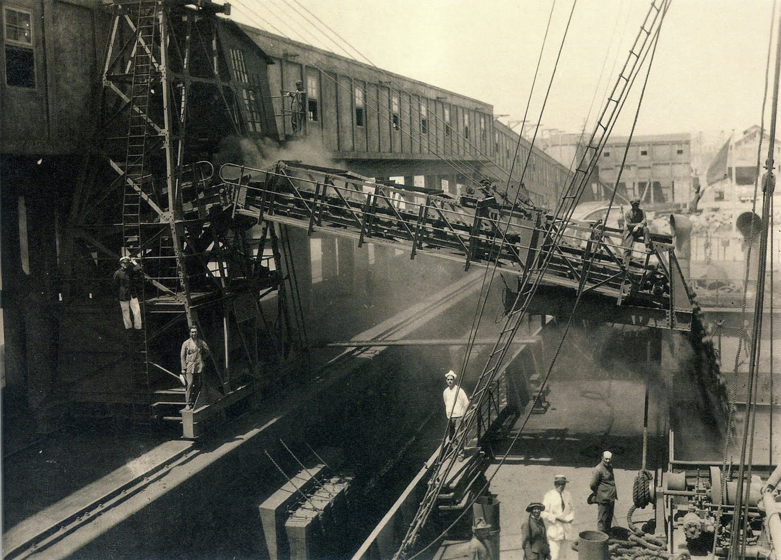 Embarque mineral de hierro por la grúa del Cargadero del mineral, Puerto de Melilla